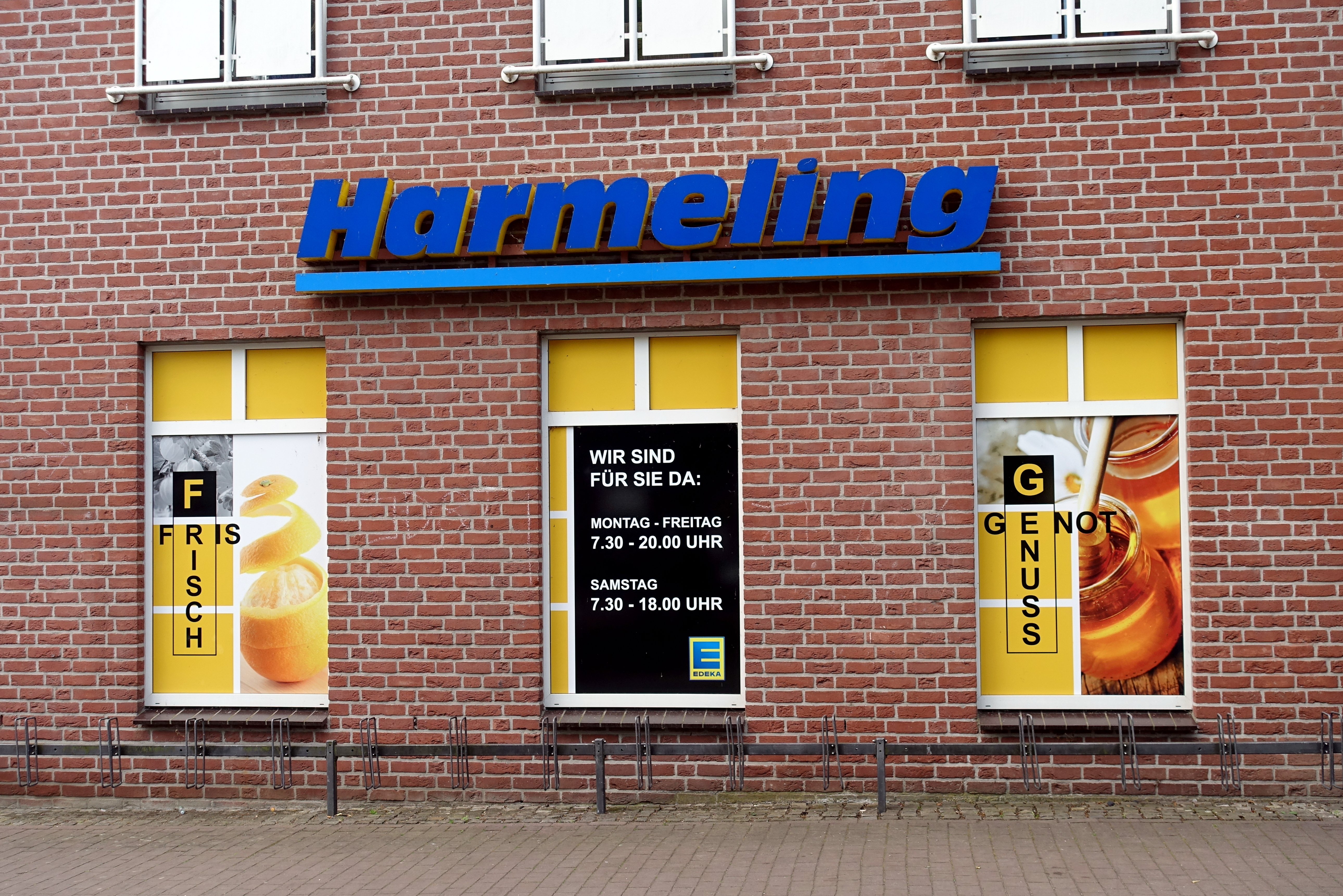 Fassade des Supermarktes Harmeling (Edeka) in Suderwick, NRW, an der Grenze zu den Niederlanden. Die Aufschriften sind teils auf Niederländisch und in Deutsch.